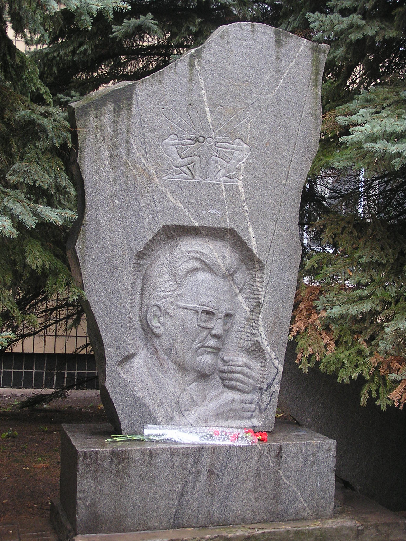 Донецк. Памятник Галкину